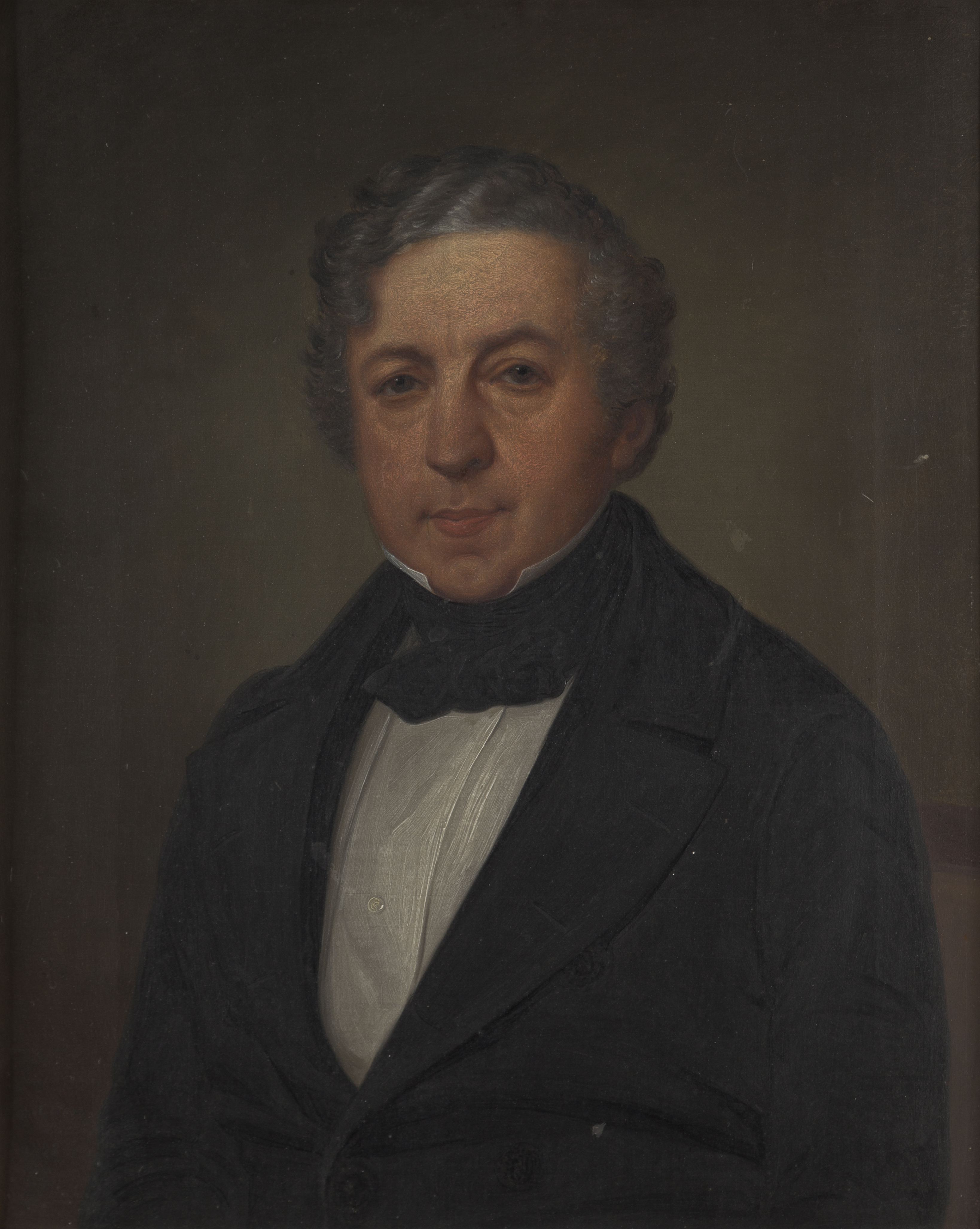 Porträtt av Julius Geber (1816-1876) avporträtterade 1848 av Carl Wilhelm Nordgren.